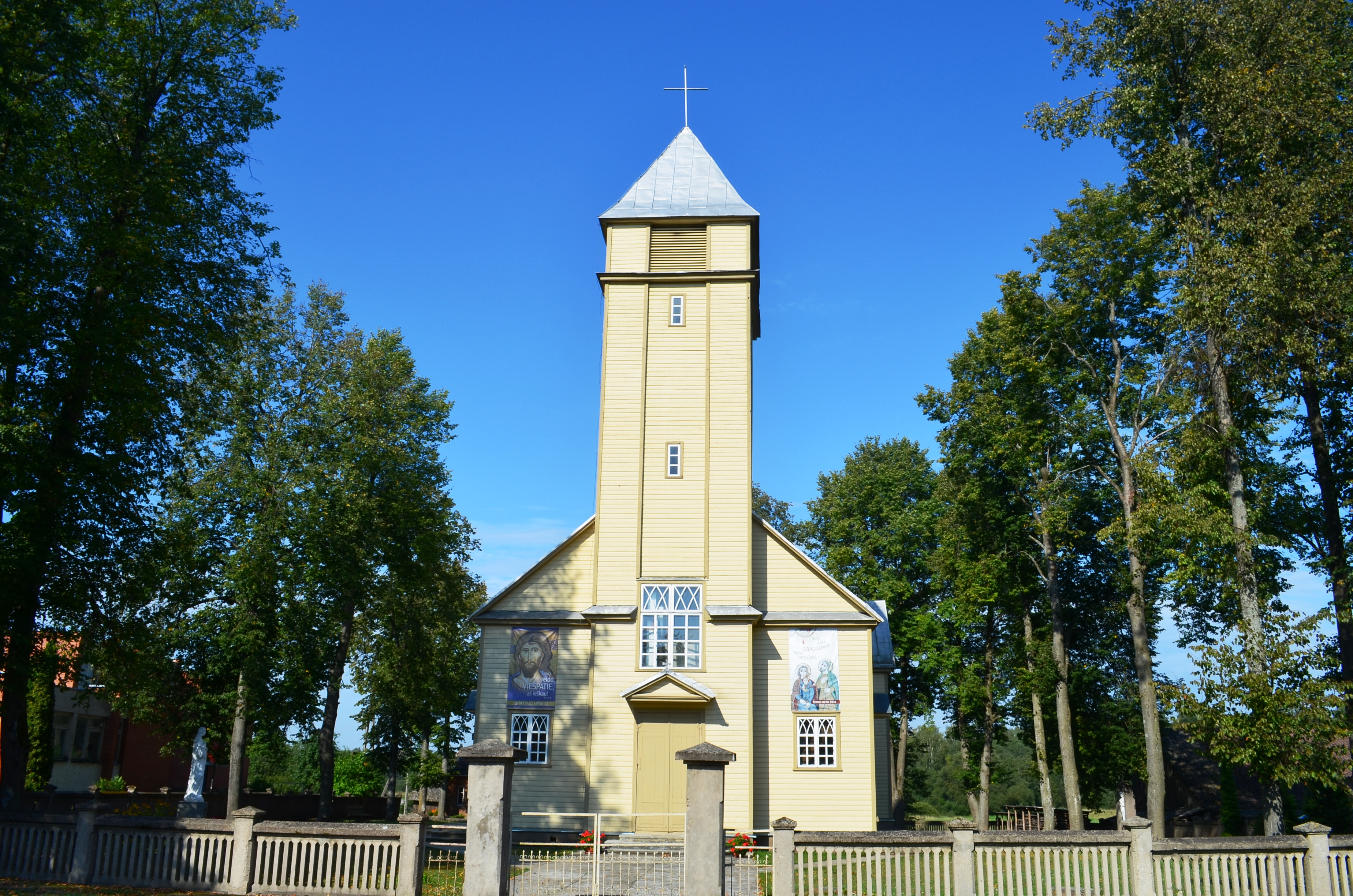 Bažnyčia, Subačius, Kupiškio r.